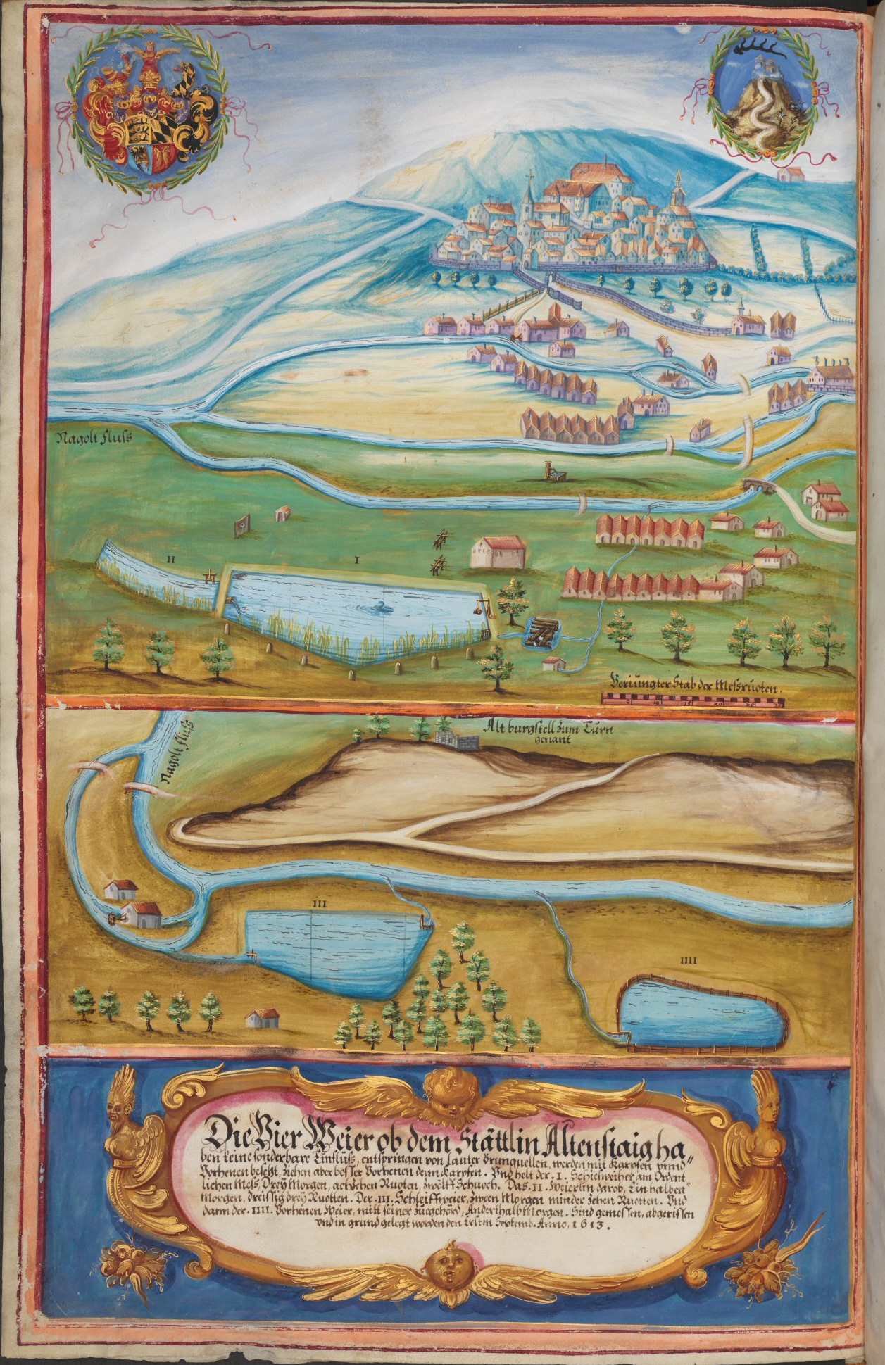 Seehbuch, darinnen alle Seeh und Weyher in dem löplichen Hertzogthumb Würtemberg. Stuttgart (?), Anfang 17. Jh.; Württembergische Landesbibliothek Stuttgart, Cod. hist. fol. 261, fol. 24v, Altensteig